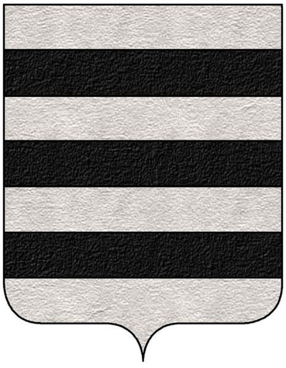 Stemma della famiglia Patrizi (Siena)